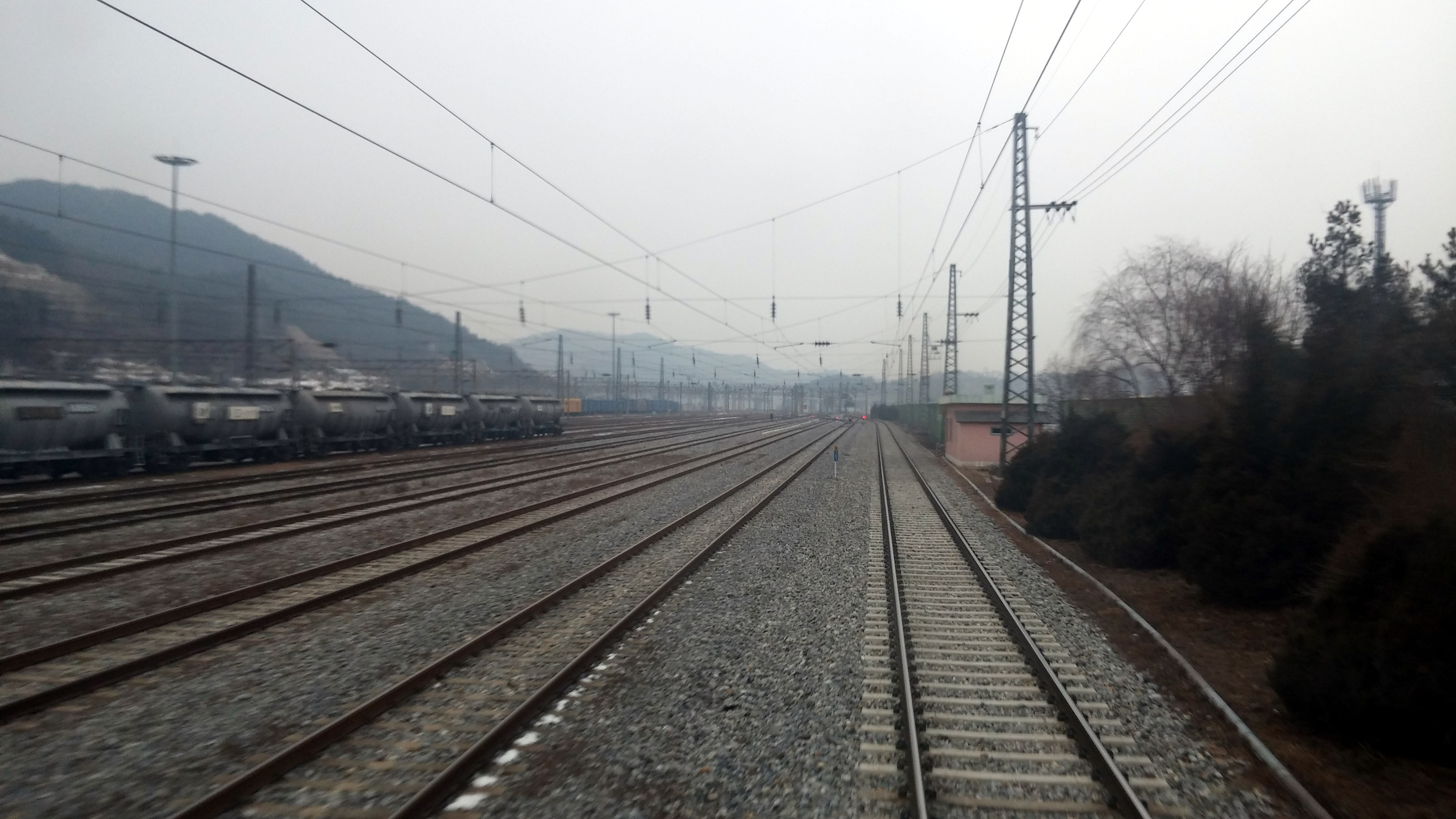 한국철도공사 제천조차장역 구내.